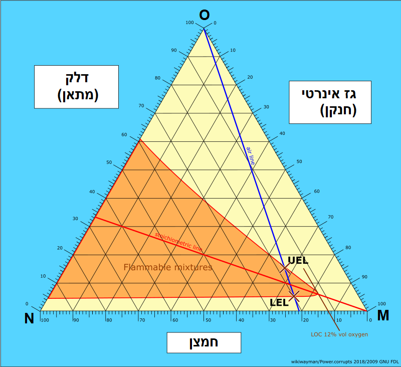 דיאגרמה טרנארית